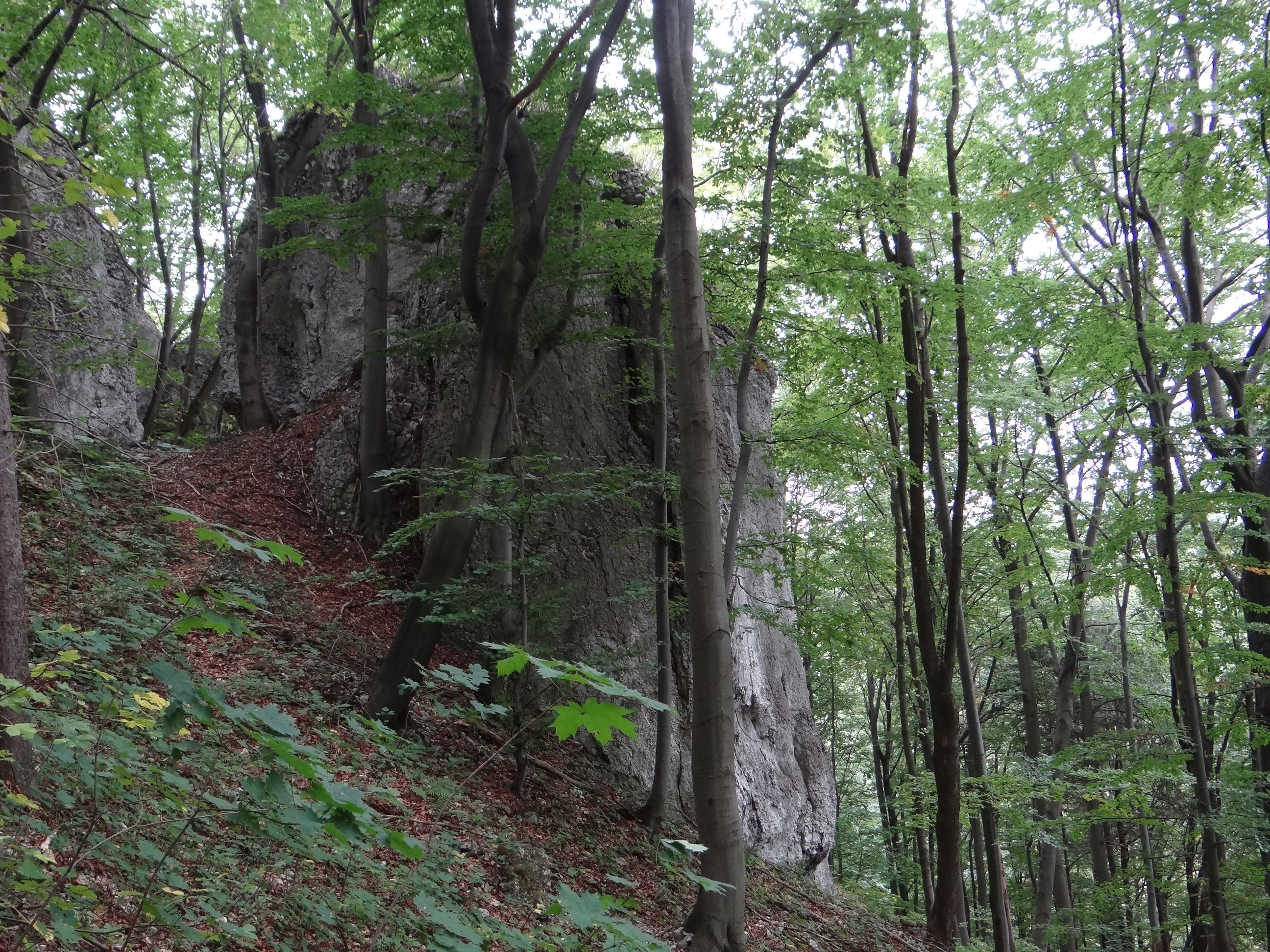 Skała Forteca w Dolinie Będkowskiej